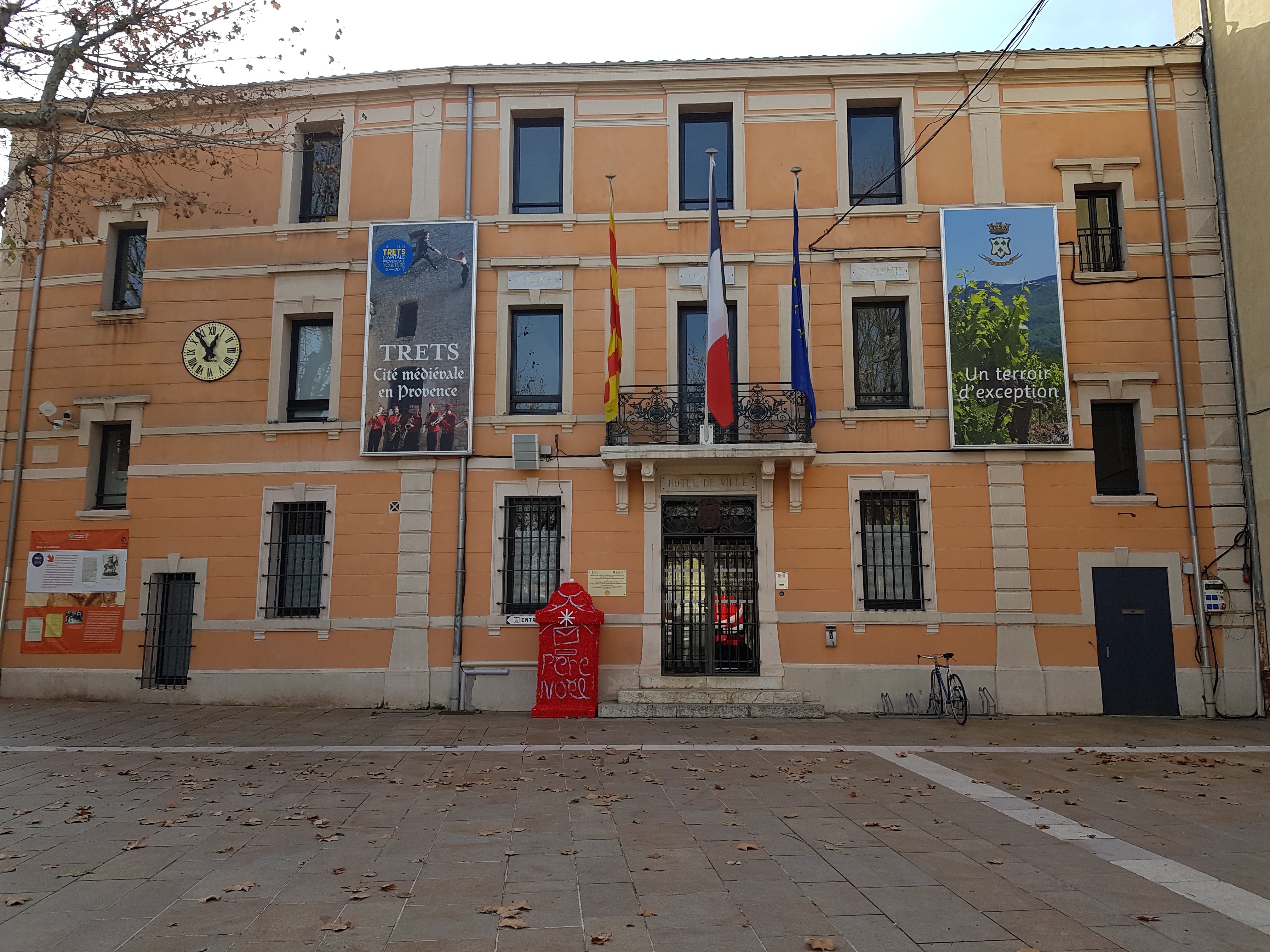 Hôtel de Ville de Trets (Bouches-du-Rhône).